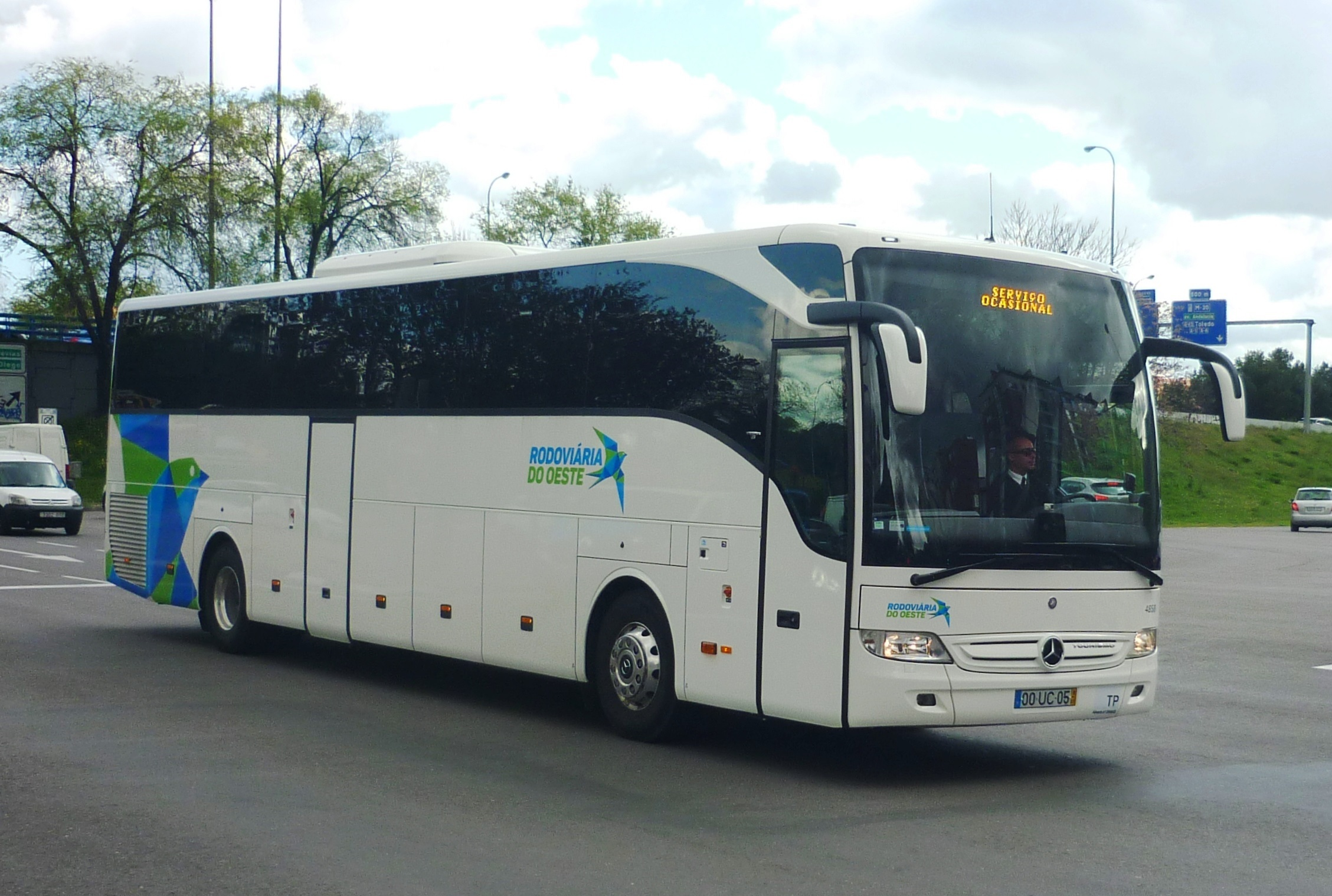 RodoviariaDoOeste(00-UC-05)